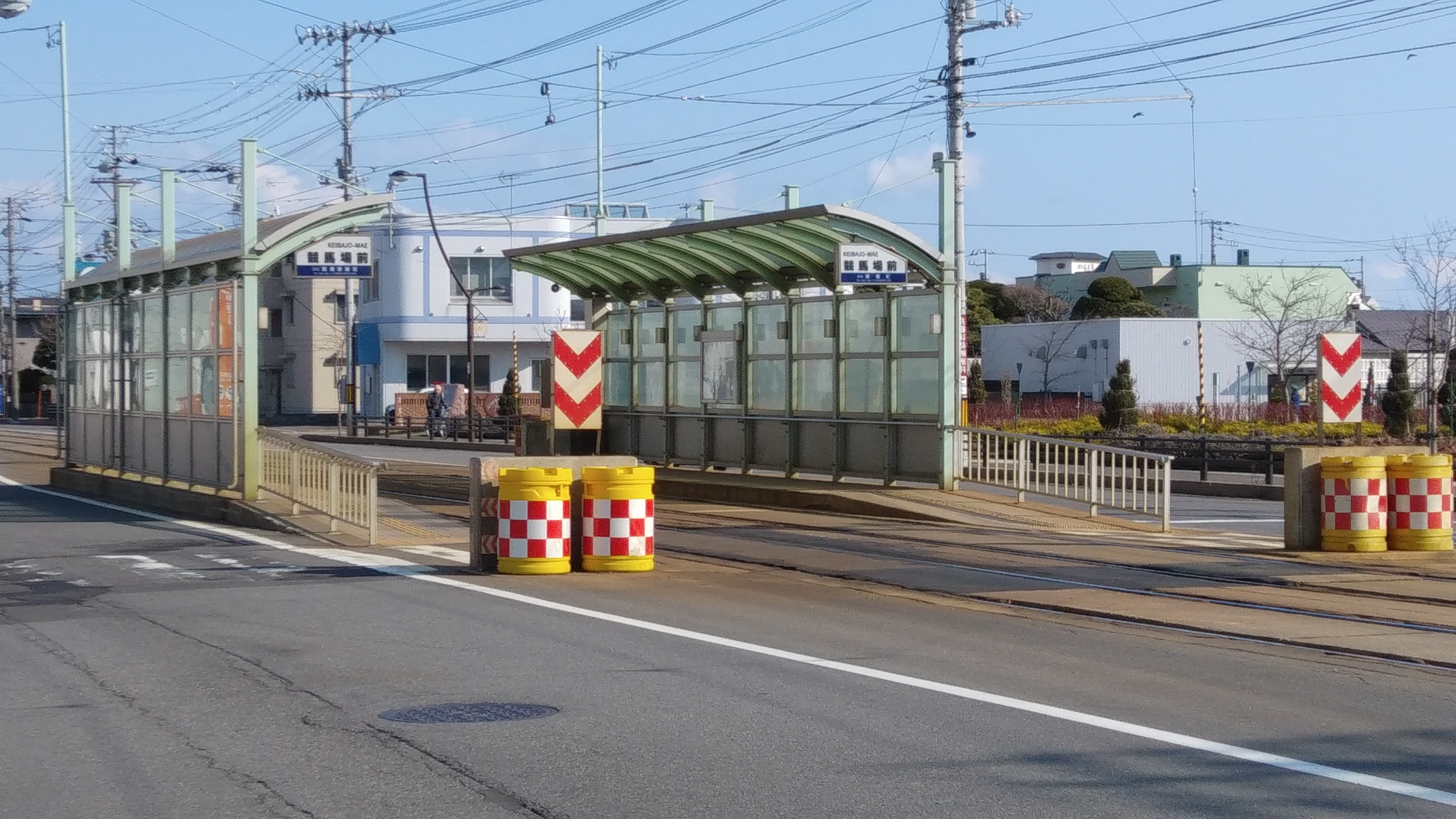 函館市企業局交通部・函館市電・競馬場前停留場の全景